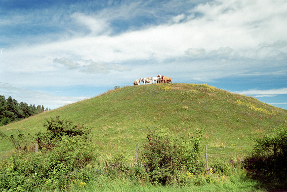 Skalunda gravhög (RAÄ-nr Skalunda 3:1) i Skalunda socken, Kållands härad, Lidköpings kommun, f.d. Skaraborgs län, Västergötland, Västra Götalands län, Sverige. Skalundahögen räknas med sina 65 meter i diameter som kungshög.